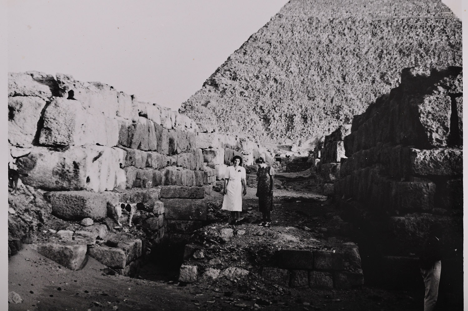 Grete Mostny en Giza, Egipto.